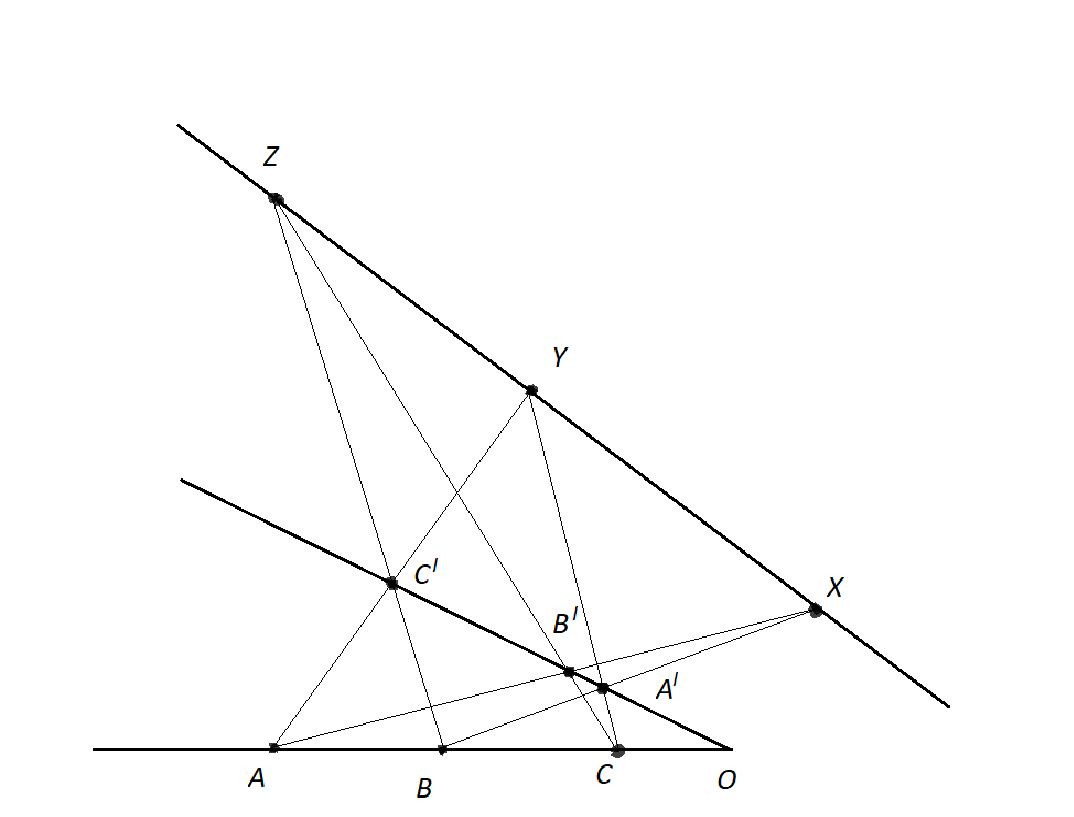 Чертеж к теореме Паппа